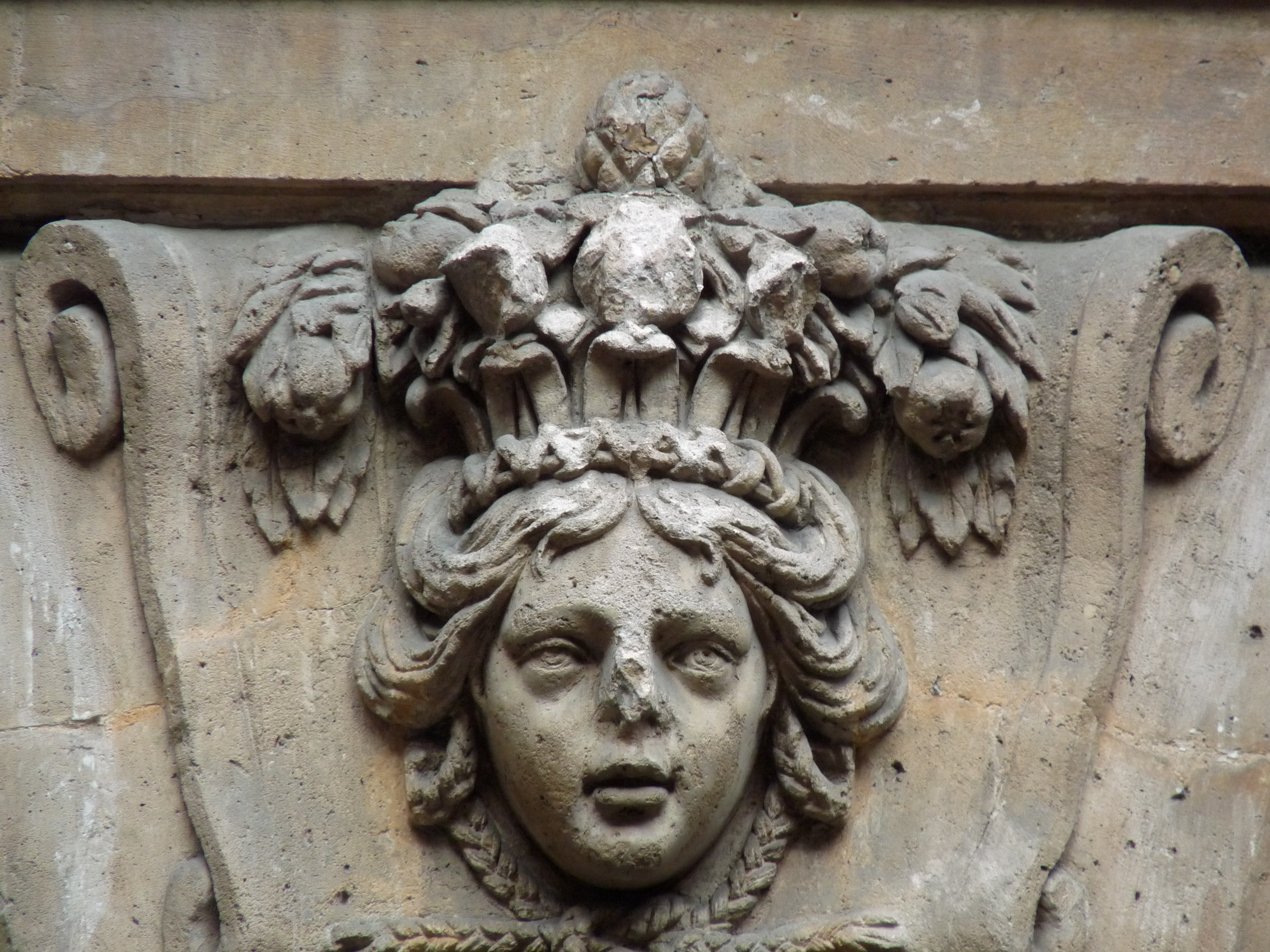 L'hôtel Amelot de Bisseuil, dit des Ambassadeurs de Hollande, à Paris. Détail, vu de la première cours.